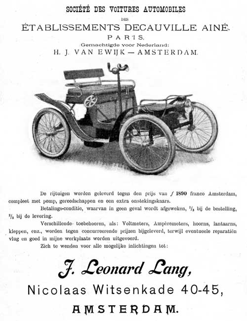 Decauville (F) - Van Ewijk, Amsterdam advertentie 1899